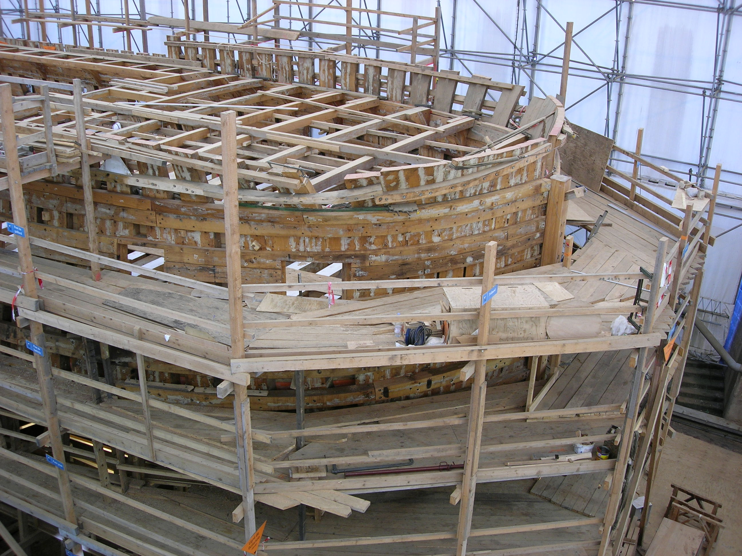 Reconstruction de l'Hermione a rochefort (France)